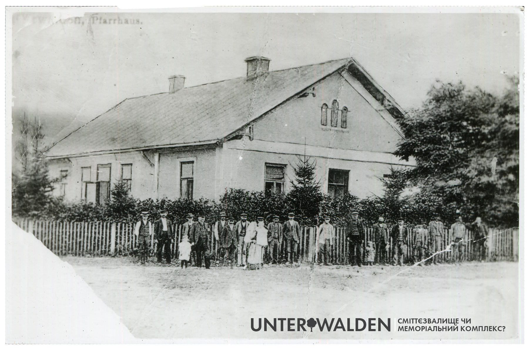 Німці з Унтервальдену біля свого парафіяльного будинку, де водночас була і школа. Фото 1930-х років. Будинок зруйновано, ймовірно, в 1950-60 роках